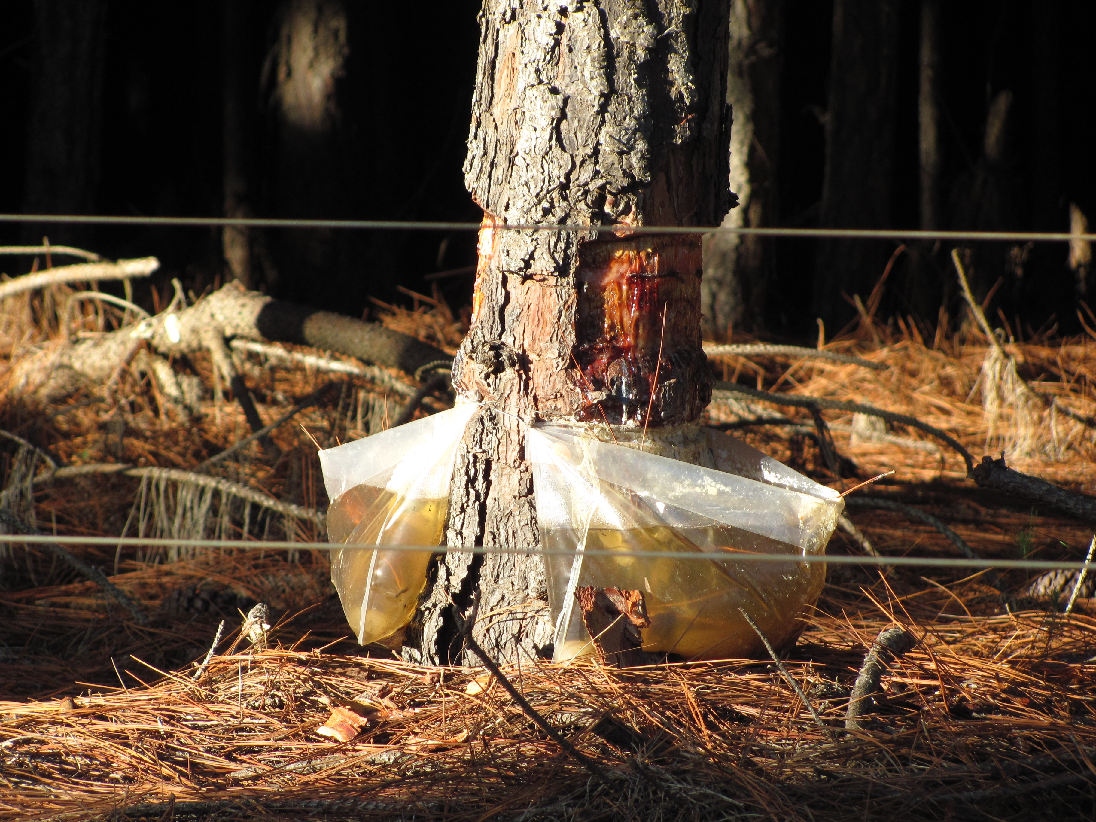 Extração de resina de Pinus